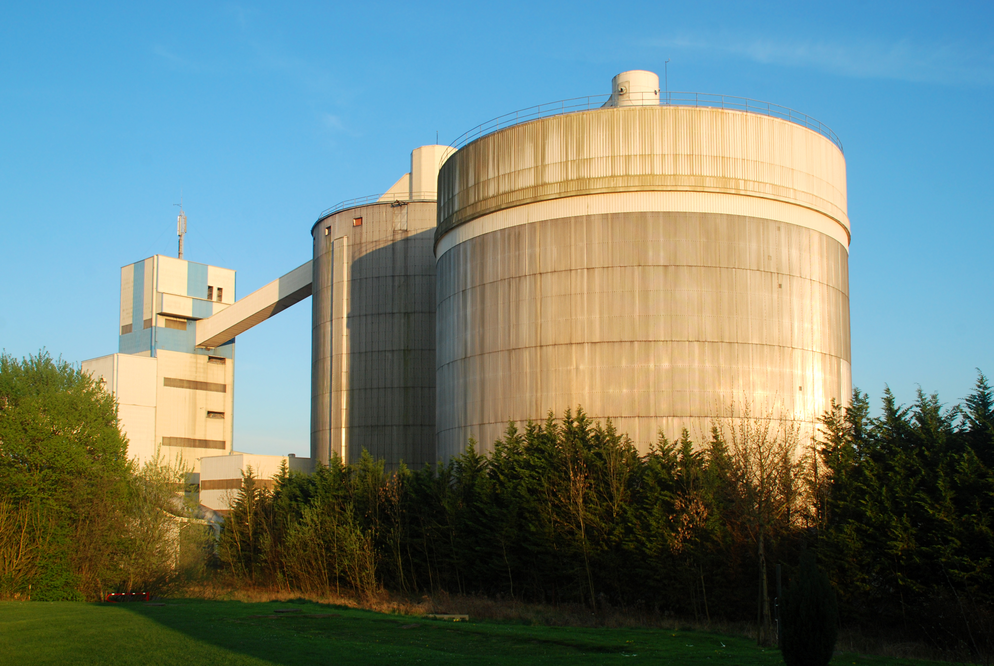 Belgique - Brabant wallon - Genappe - Sucreries de Genappe